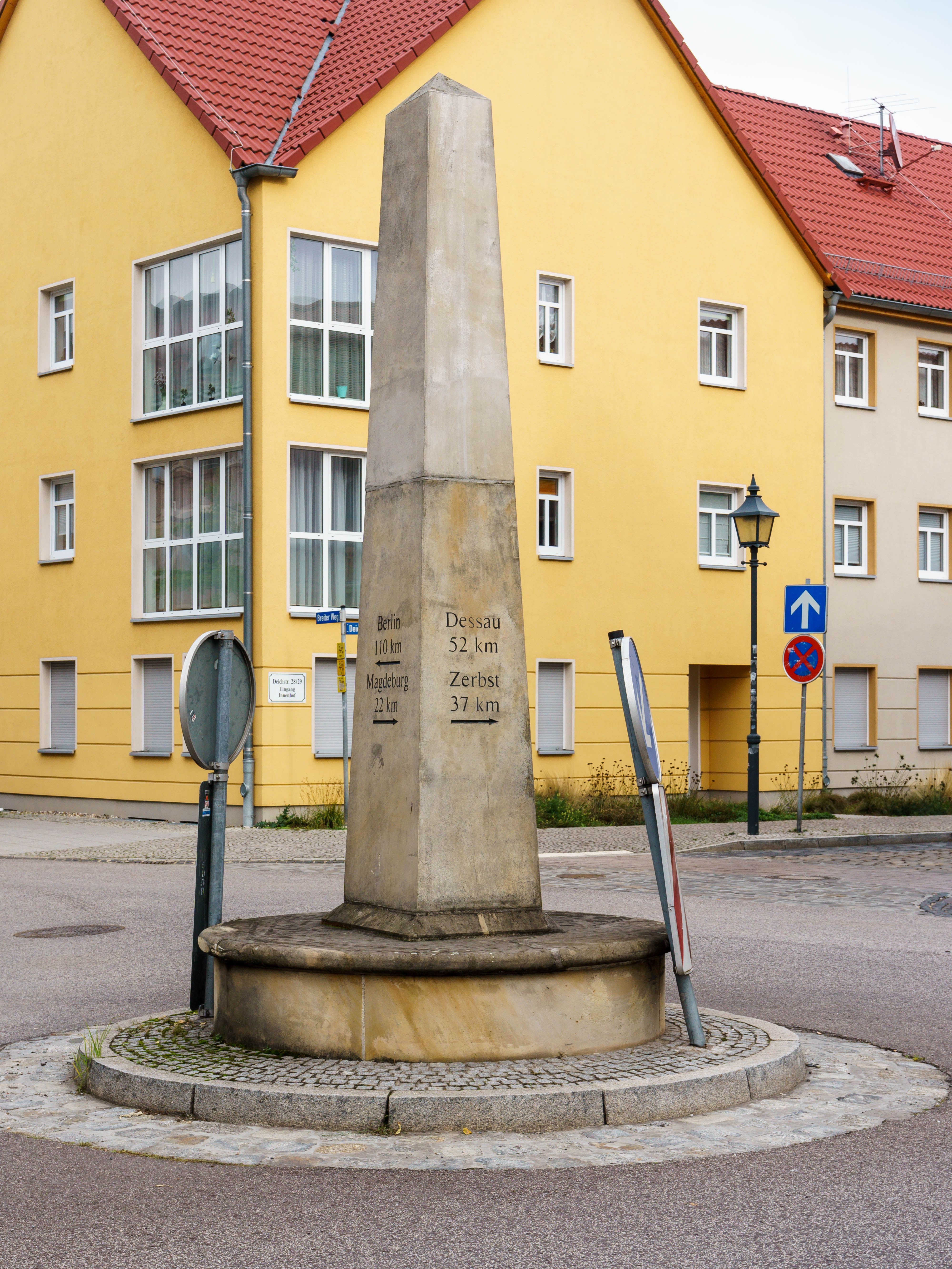 Preußischer Ganzmeilenobelisk mit Sitzbank (1588) Breiter Weg / Zerbster Straße / Markt in Burg (bei Magdeburg). Inschrift: Seite 1: Dessau | 52 km | Zerbst | 37 km ; Seite 2: Berlin | 110 km | Magdeburg | 22 km ; Seite 3: Berlin | 110 km